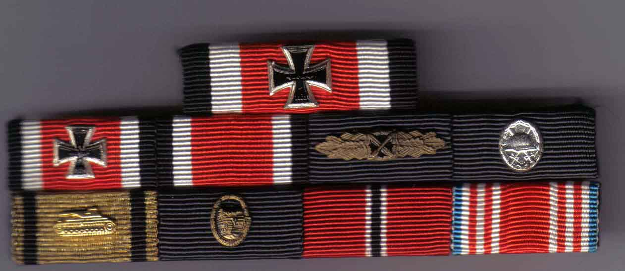 Militärische Auszeichnungen Hitler-Deutschland 1933-1945, hier Ordensspange Johann Lutz: 1. Reihe – Ritterkreuz des Eisernen Kreuzes 2. Reihe v.l.n.r. – Eisernes Kreuz I. Klasse, Eisernes Kreuz II. Klasse, Nahkampfspange (Bonze), Verwundetenabzeichen (Silber) 2. Reihe v.l.n.r. – Panzervernichtungsabzeichen (Gold), Panzerkampfabzeichen (Bronze), Medaille Winterschlacht im Osten 1941/42, ???.